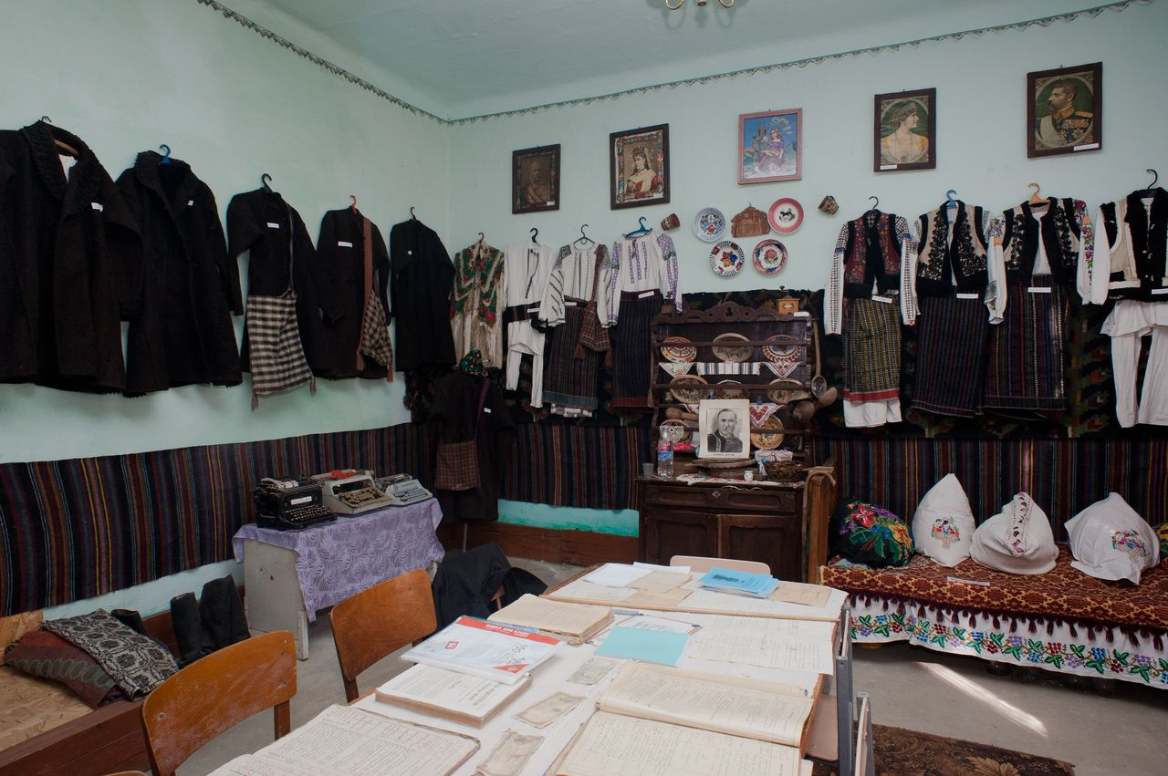 В Музее НП